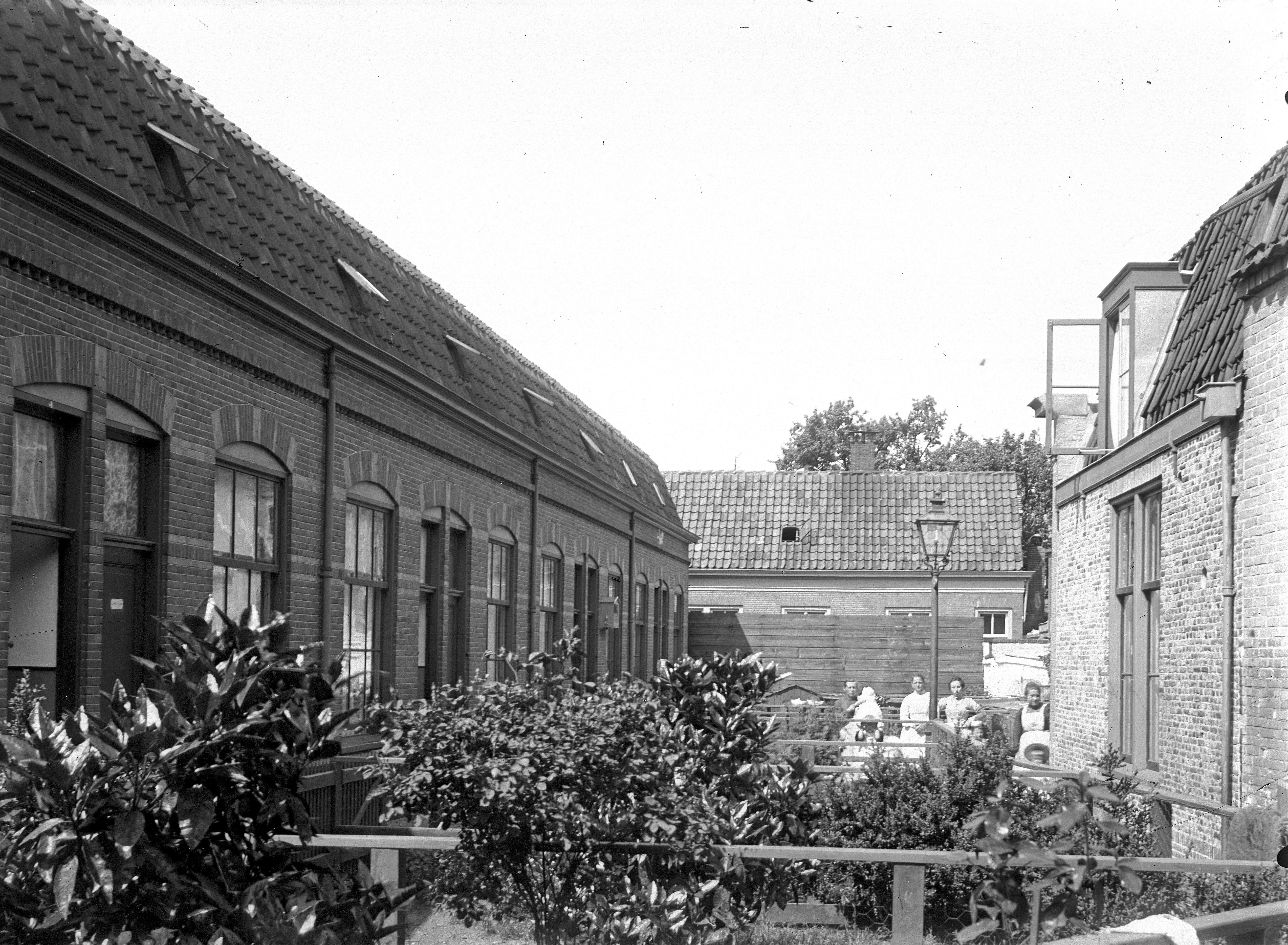 Hof van Venetie aan de Uiterstegracht gezien van de binnenplaats naar de Sophiapoort. Links de nummers 4-11, rechts nr 12.